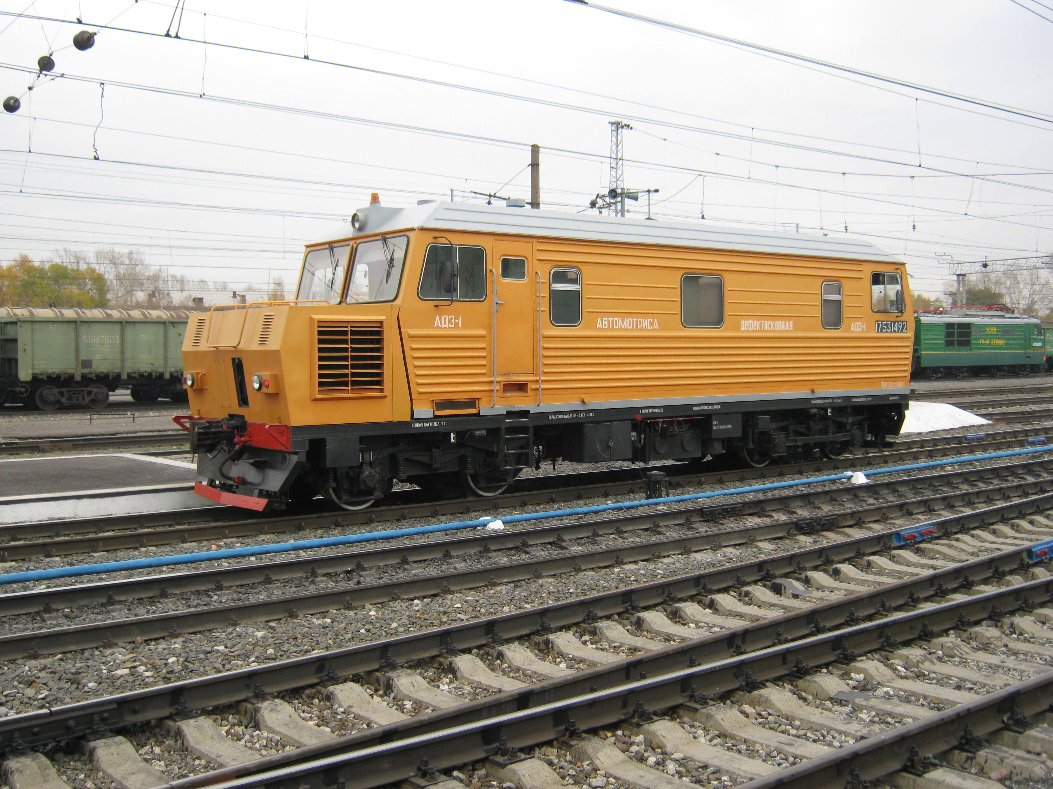 автомотриса дефектоскопная электрическая АДЭ-1, Калужского завода путевых машин и гидроприводов. Фотография сделана в 2011 году на ст.Новокузнецк, Западно-Сибирской железной дороги, цифровой фотокамерой Canon PowerShot A480 с разрешением 10 Мпкс.